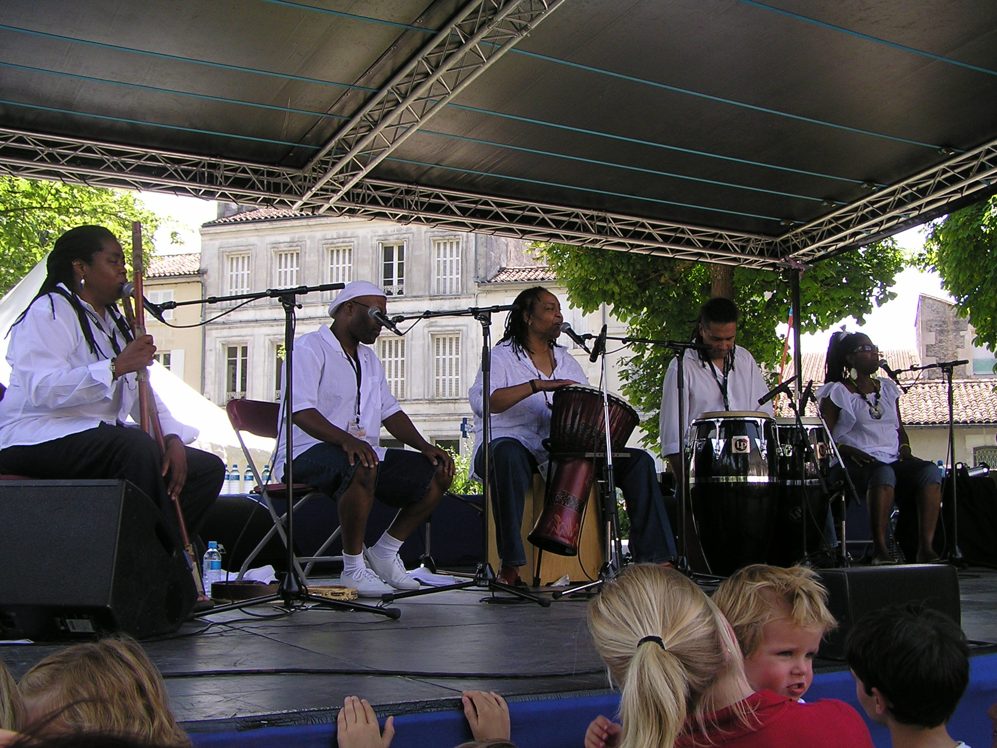 Linda Tillery and the cultural Heritage Choir à à Cognac Blues Passions 2008